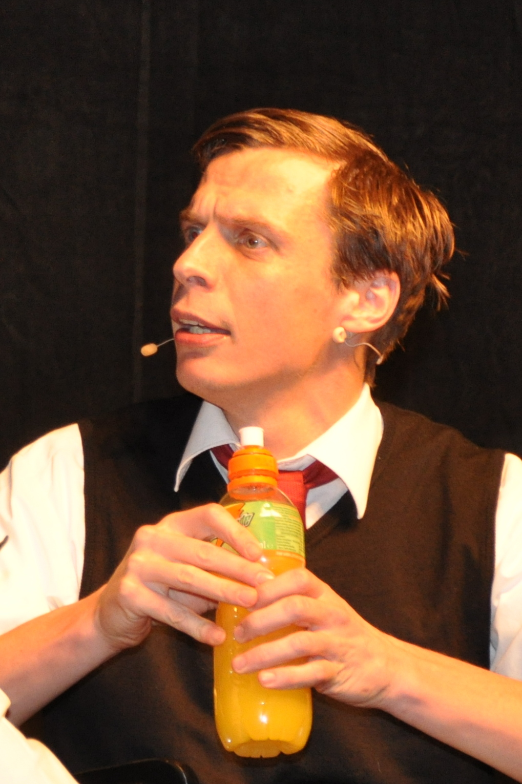 Klaus Eckel im Kabarettprogramm "99" (gemeinsam mit Günther Lainer) in St. Gotthard im Mühlkreis